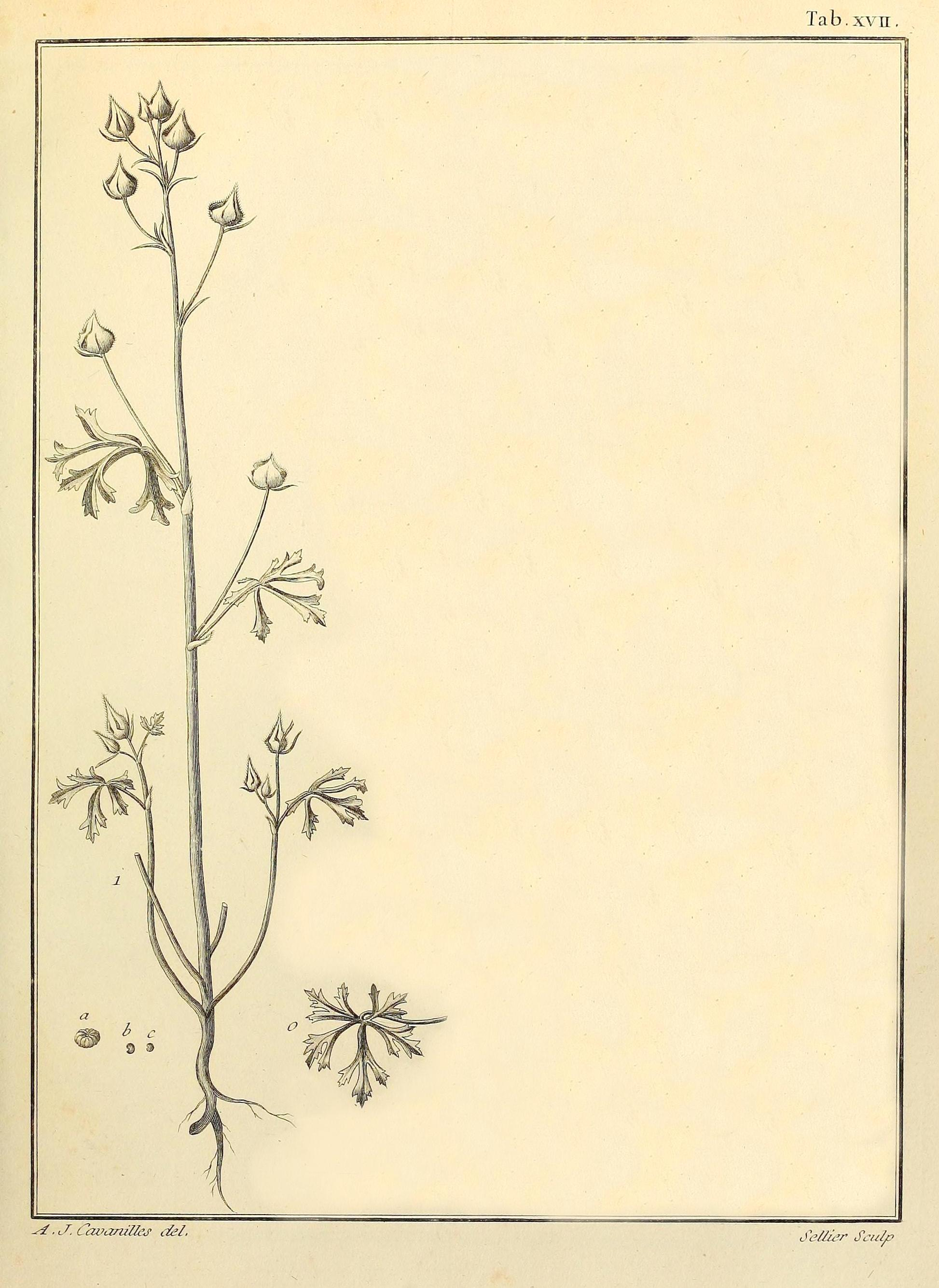 Malva aegyptia L., 1753 non Steudel, 1779, en Cavanilles, A.J., Monadelphiae classis dissertationes decem, vol. 1(2): p. 61, t. 17, fig. 1, 1786.